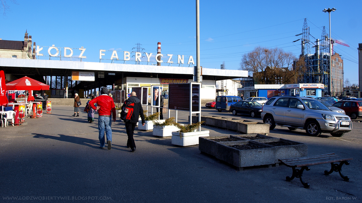 Dworzec Fabryczny od strony parkingu